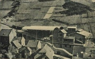 Talbahnhof der zwischen 1885 und 1917 verkehrenden Zahnradbahn von Assmannshausen zum Jagdschloss Niederwald um 1900